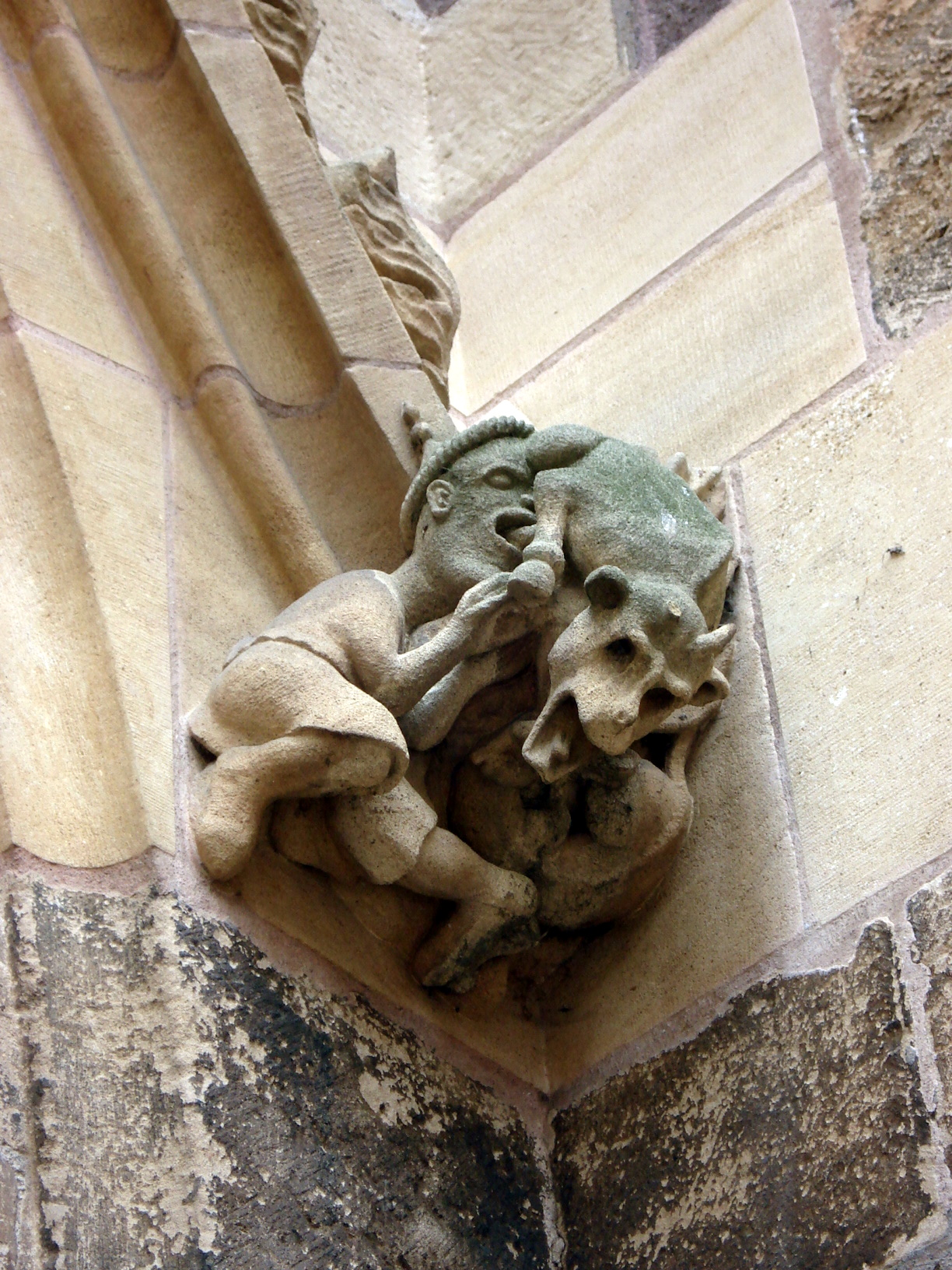 « Judensau » (représentation de juif) ornant la façade occidentale de la cathédrale de Colmar, Haut-Rhin, Alsace, France.